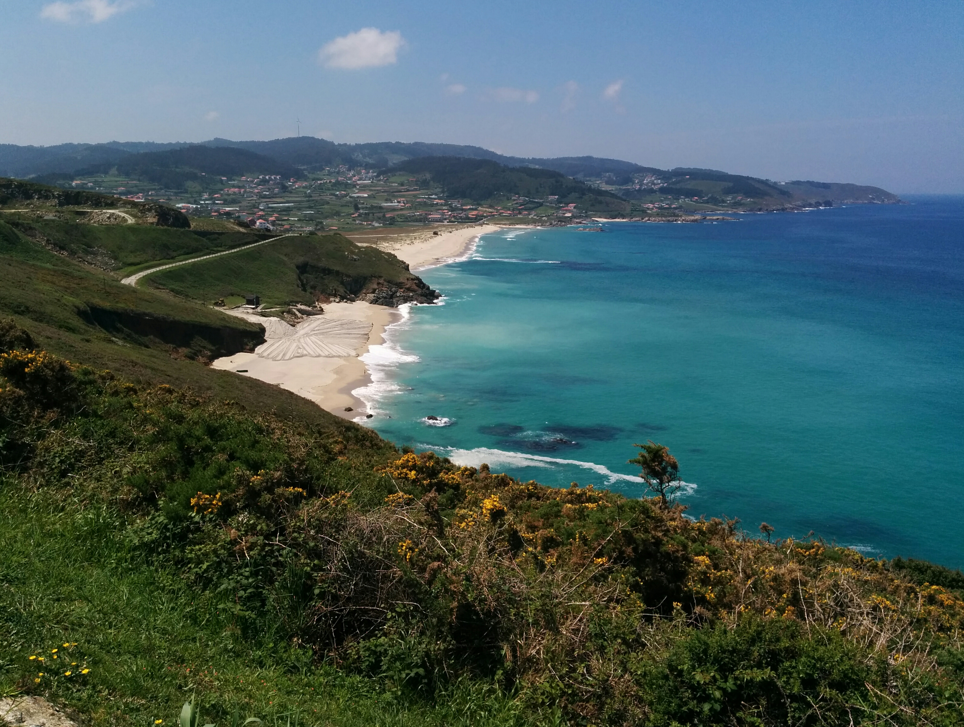 Praias de Barrañán e Combouzas, no concello de Arteixo. Pertencen ó Lugar de Importancia Comunitaria Costa da Morte. This is a photography of a Site of Community Importance in Spain with the ID: ES1110005. Natura2000 entry, EEA entry